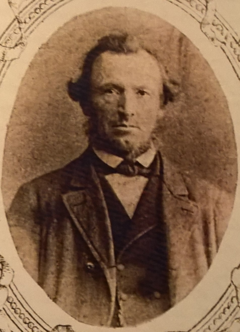 Abzug einer Fotografie von Peter Dickel (1819-1896)